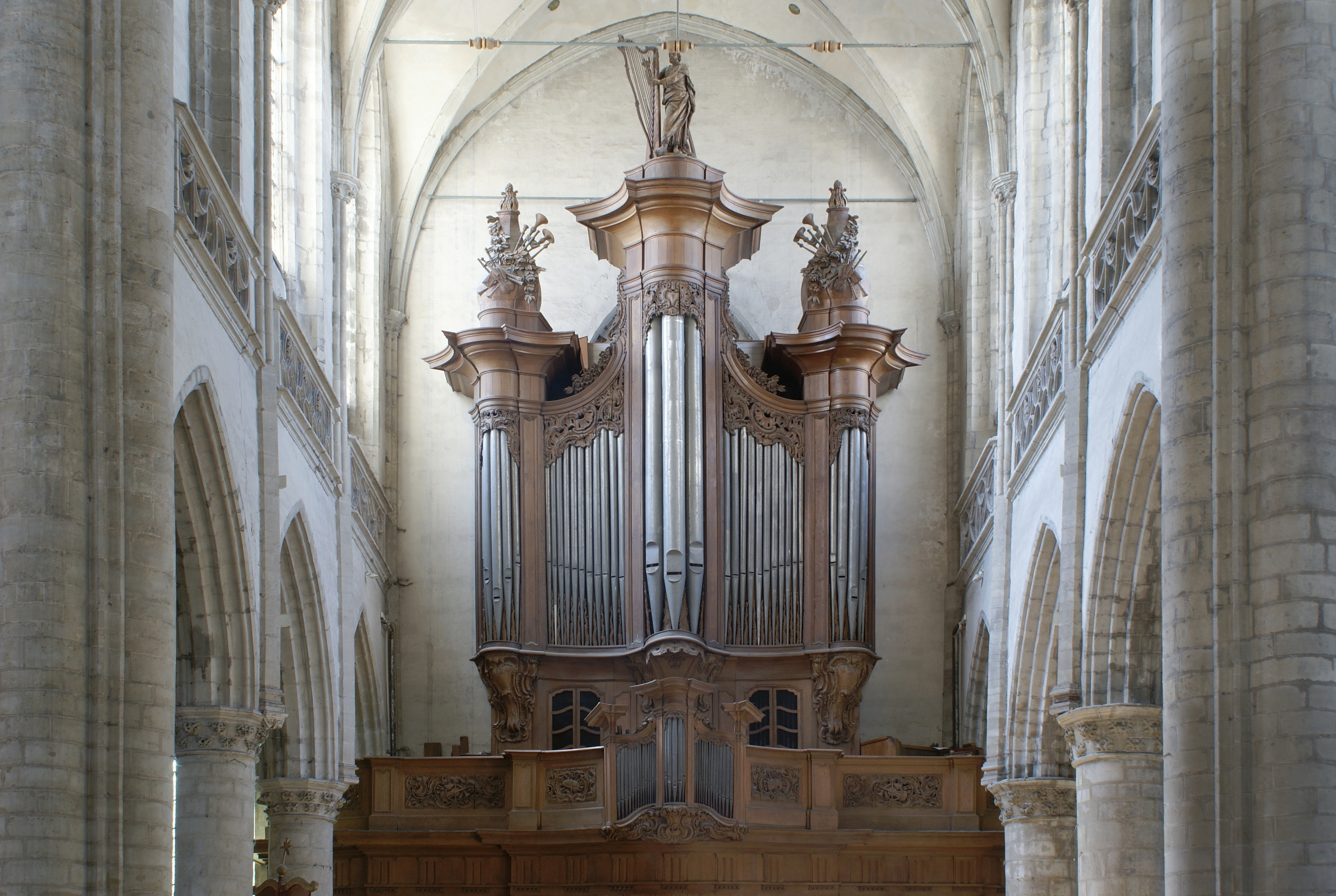 Sint-Martinuskerk (Aalst) - Doksaal en Orgel